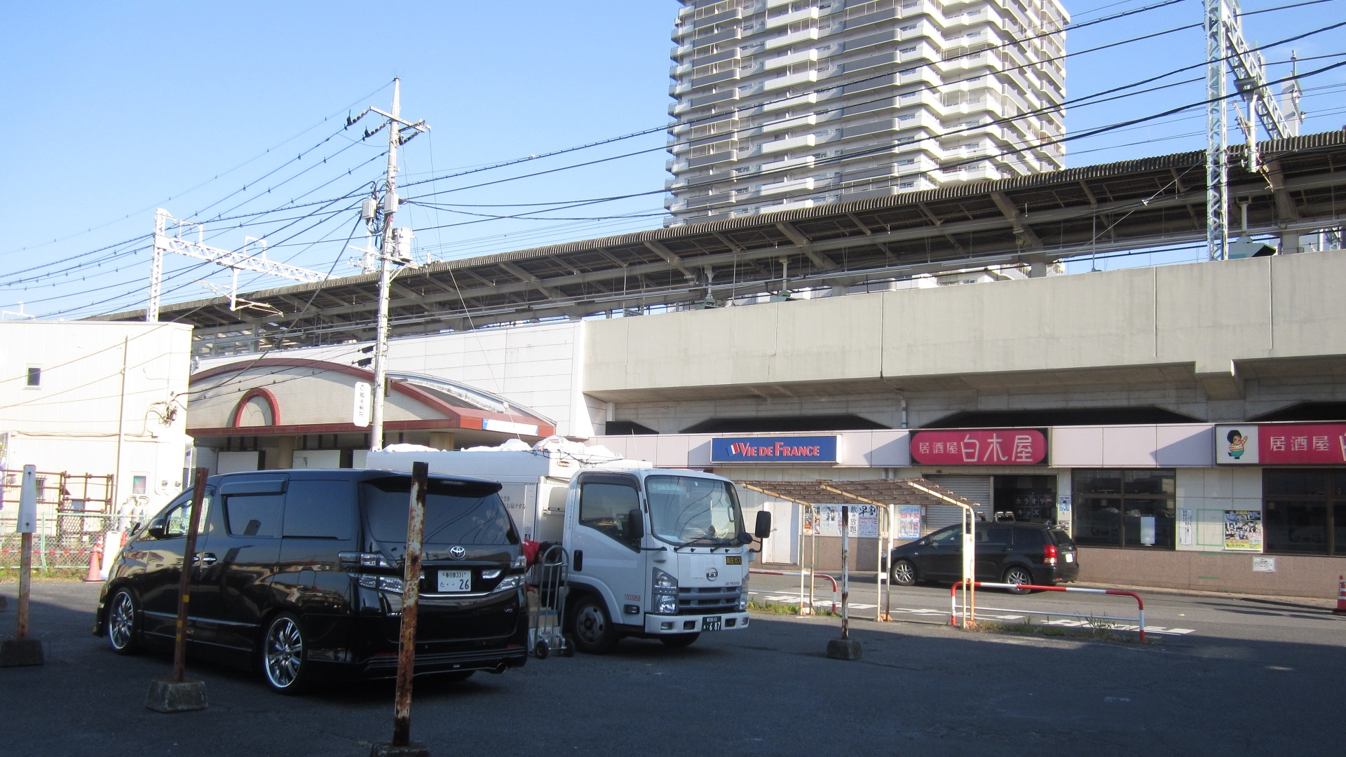 Das ist stations Foto von Japan.